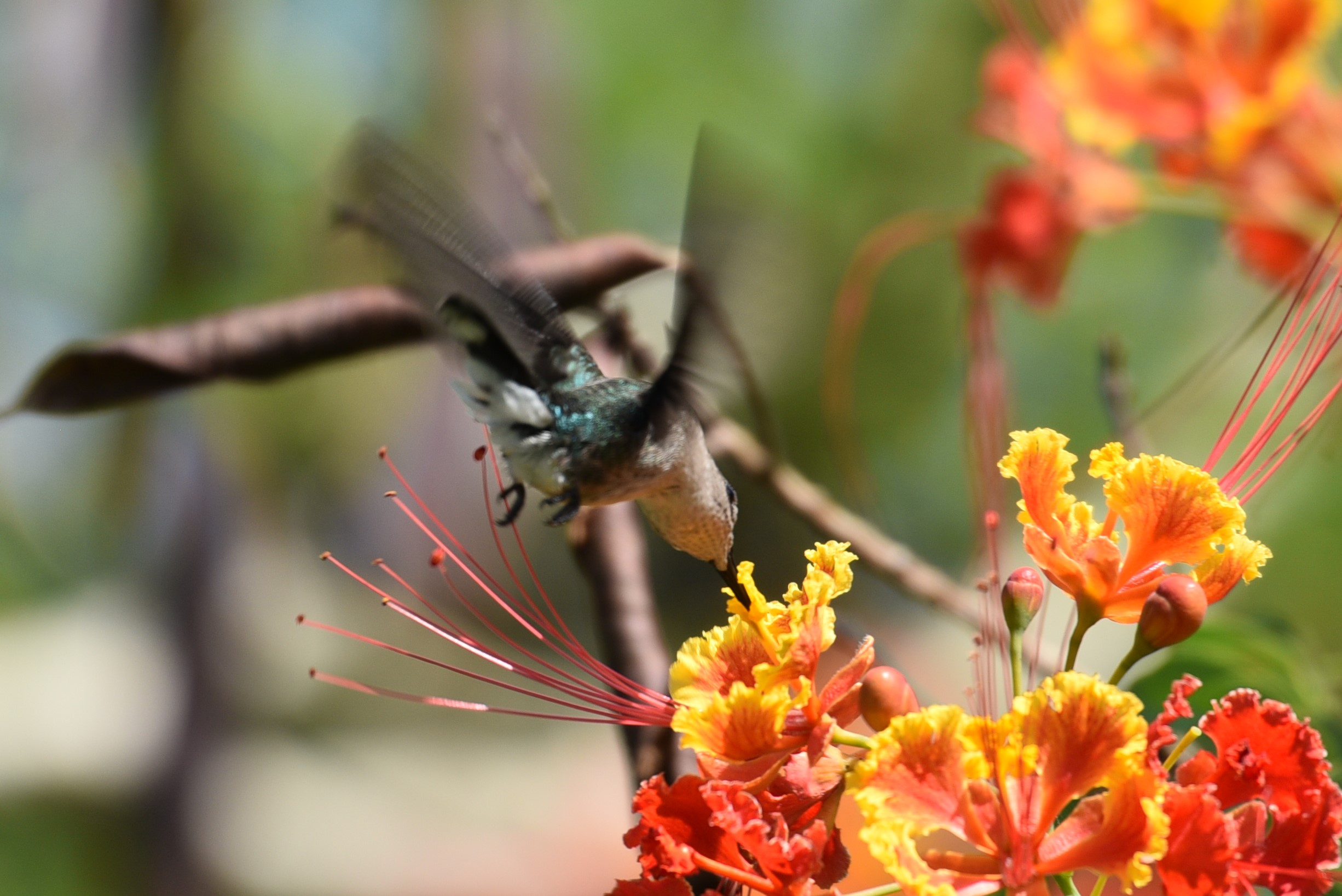 Hispaniolasmaragdkolibri (Chlorostilbon swainsonii) im Süden der Dominikanische Republik fotografiert